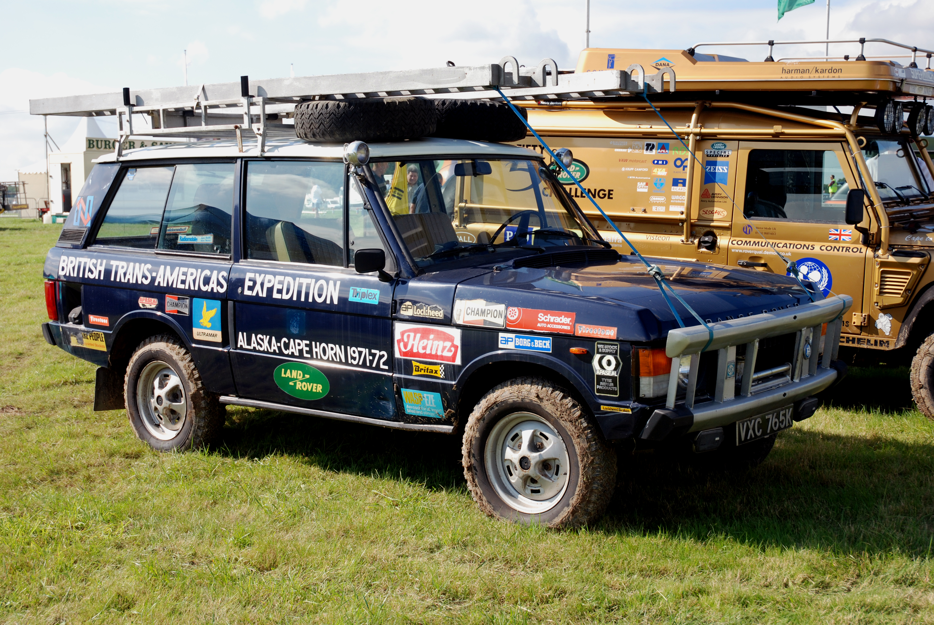 @ Dunsfold Wheels and Wings 2007